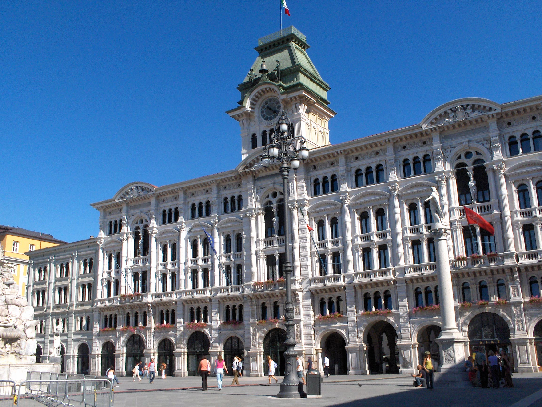 Municipio (City Hall), Piazza Unità d'Italia, Trieste